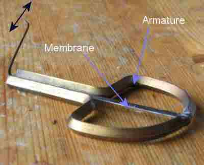 Une guimbarde